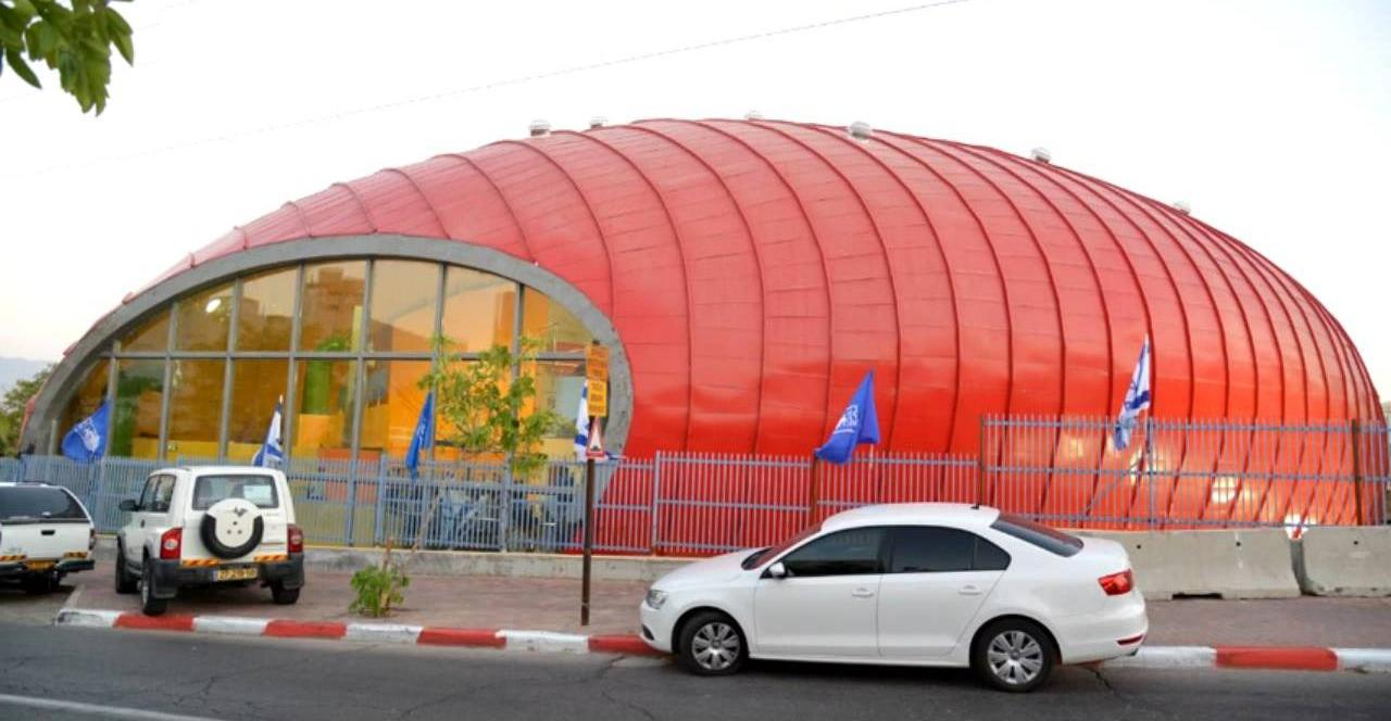 Eilat Sports Center אולם ספורט צאלים אילת